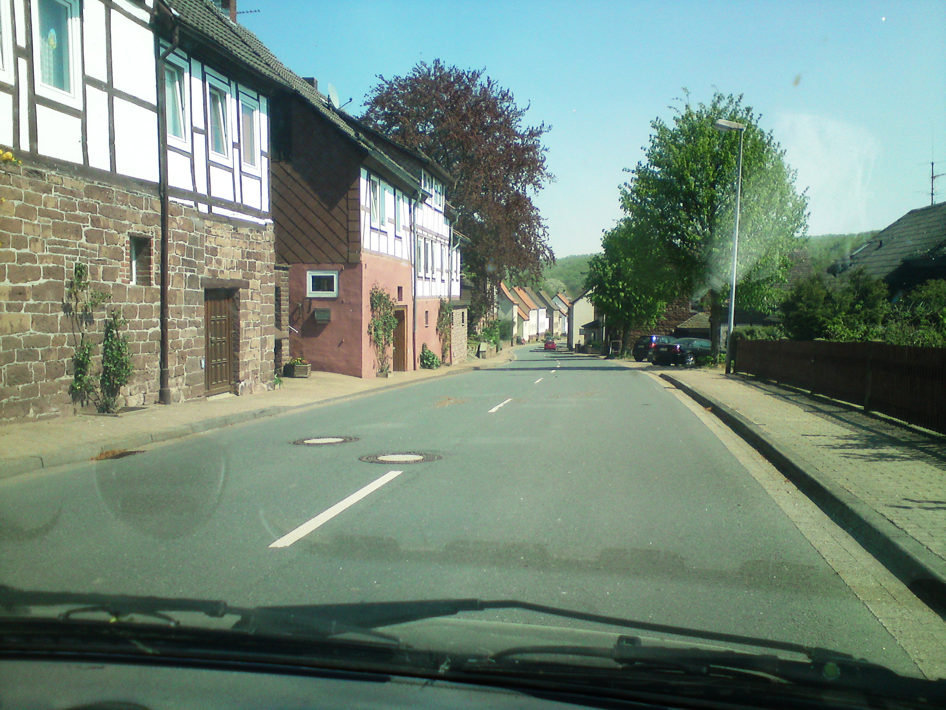 Die Hauptstrasse in Derental (vom Kopf in Richtung Anger)